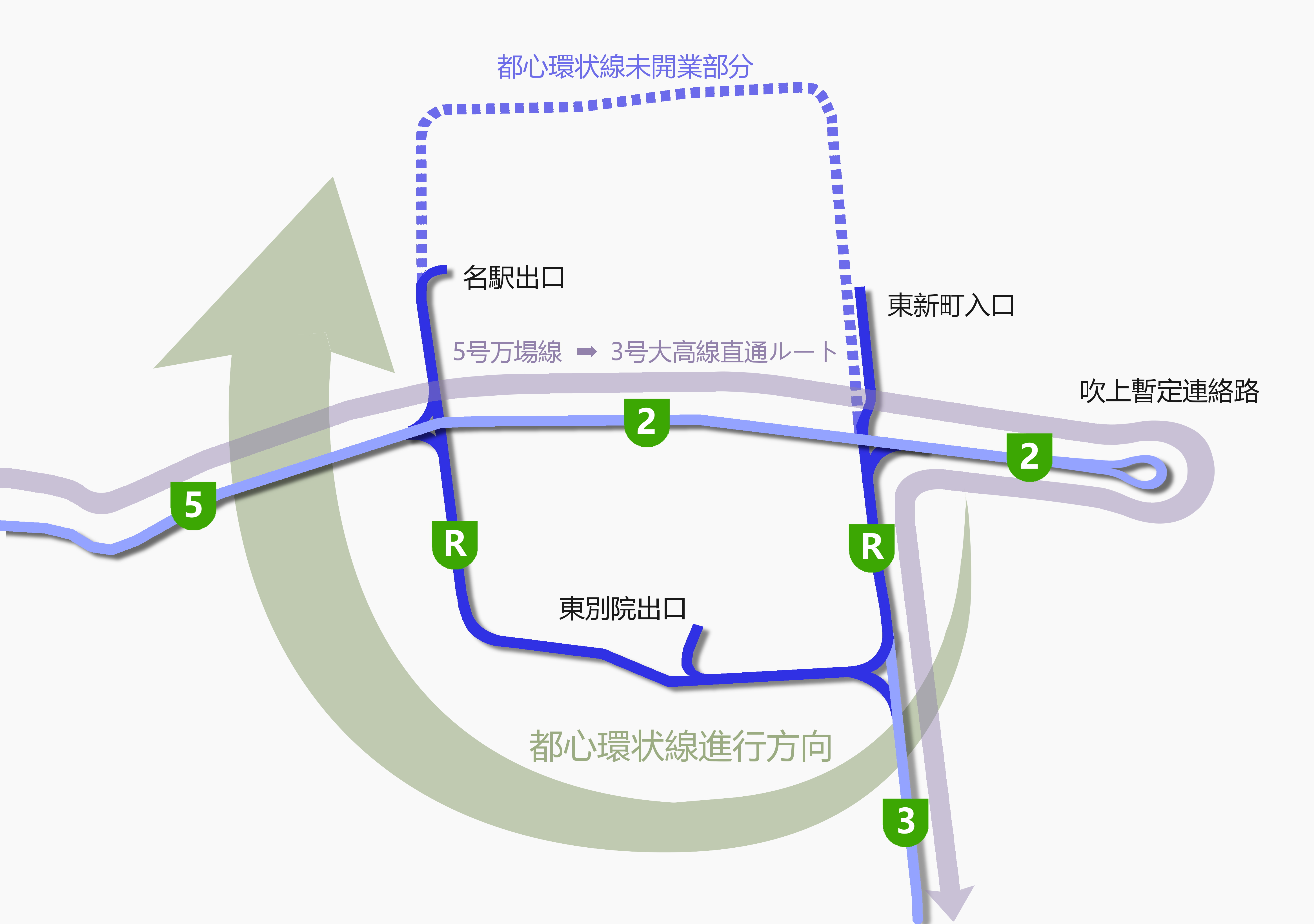 名古屋高速都心環状線 1988年4月当時の状態